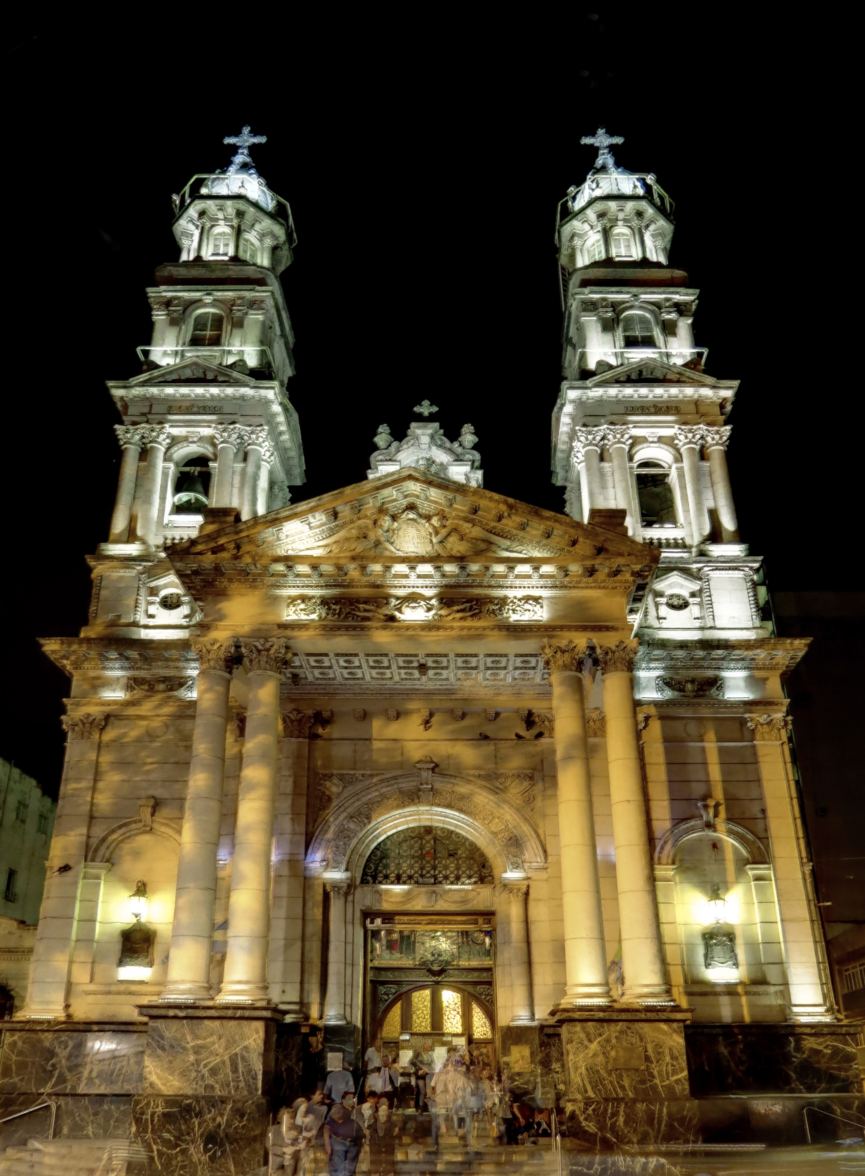 Centro histórico de Rosario